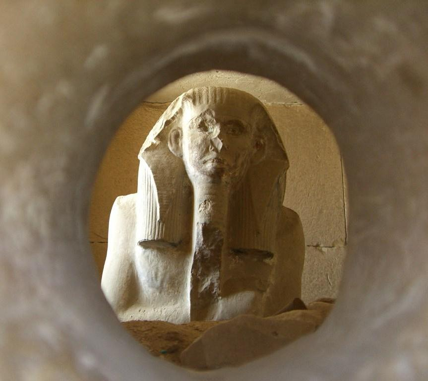 Statue de Djéser dans le serdab de son temple funéraire - Saqqarah - IIIe dynastie égyptienne